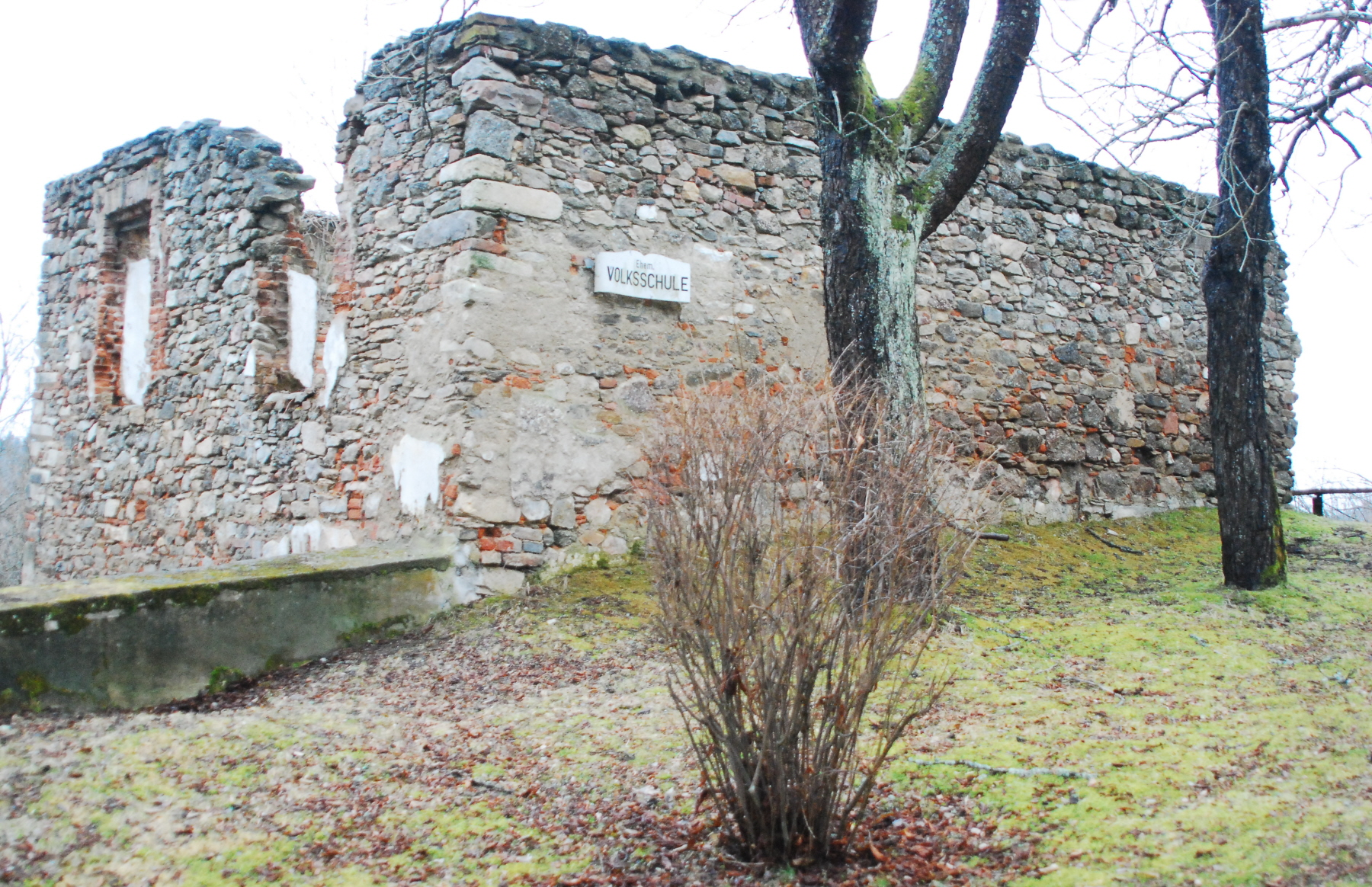 Ruine der Volksschule von Döllersheim auf dem Areal des Truppenübungsplatzes Allentsteig in Niederösterreich